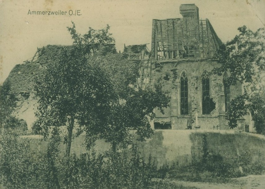 Ammerzweiler im Elsass nach Zerstörung im 1. Weltkrieg